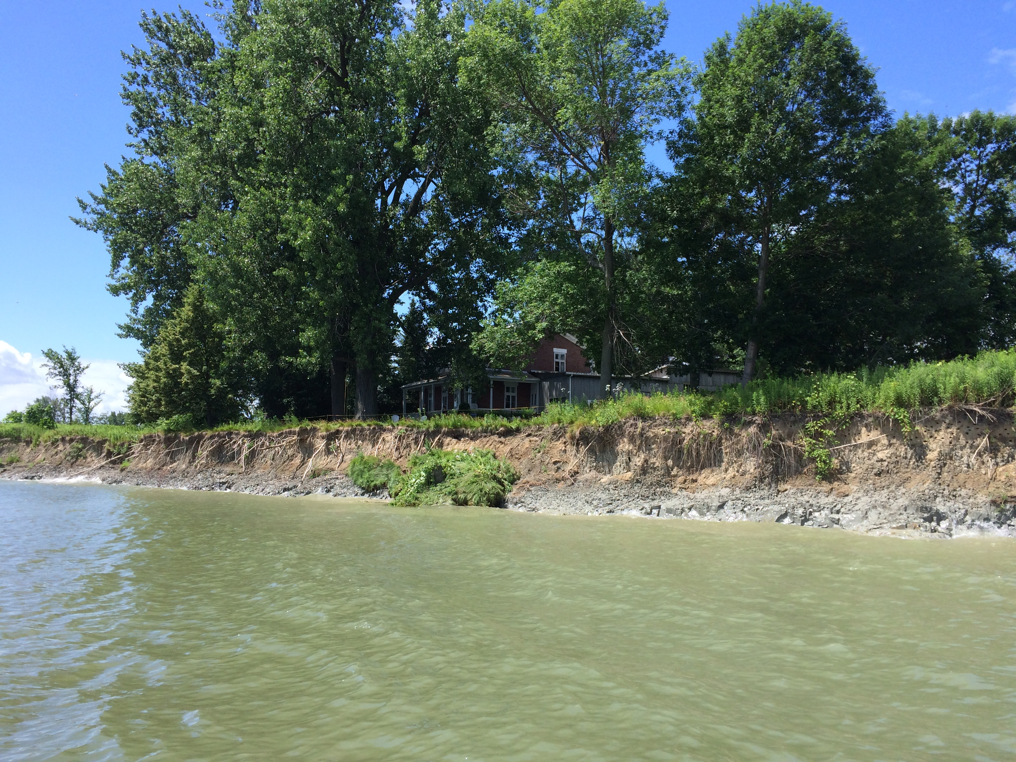 Maison Durocher construite en 1913 sur l'île Sainte-Thérèse. La maison est menacée par l'érosion de la rive causée par le batillage